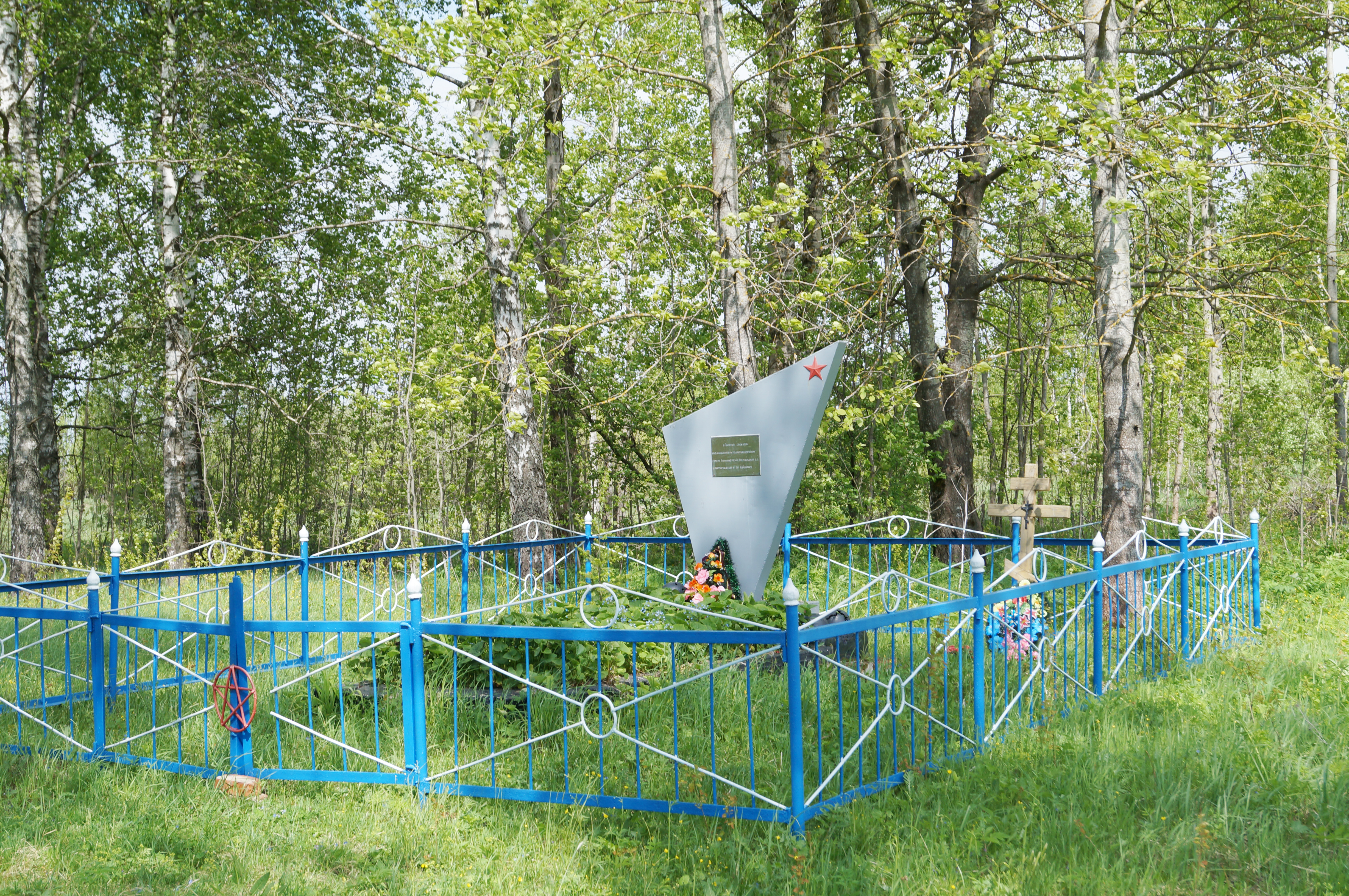 Пыренка (Думиничский район), памятник